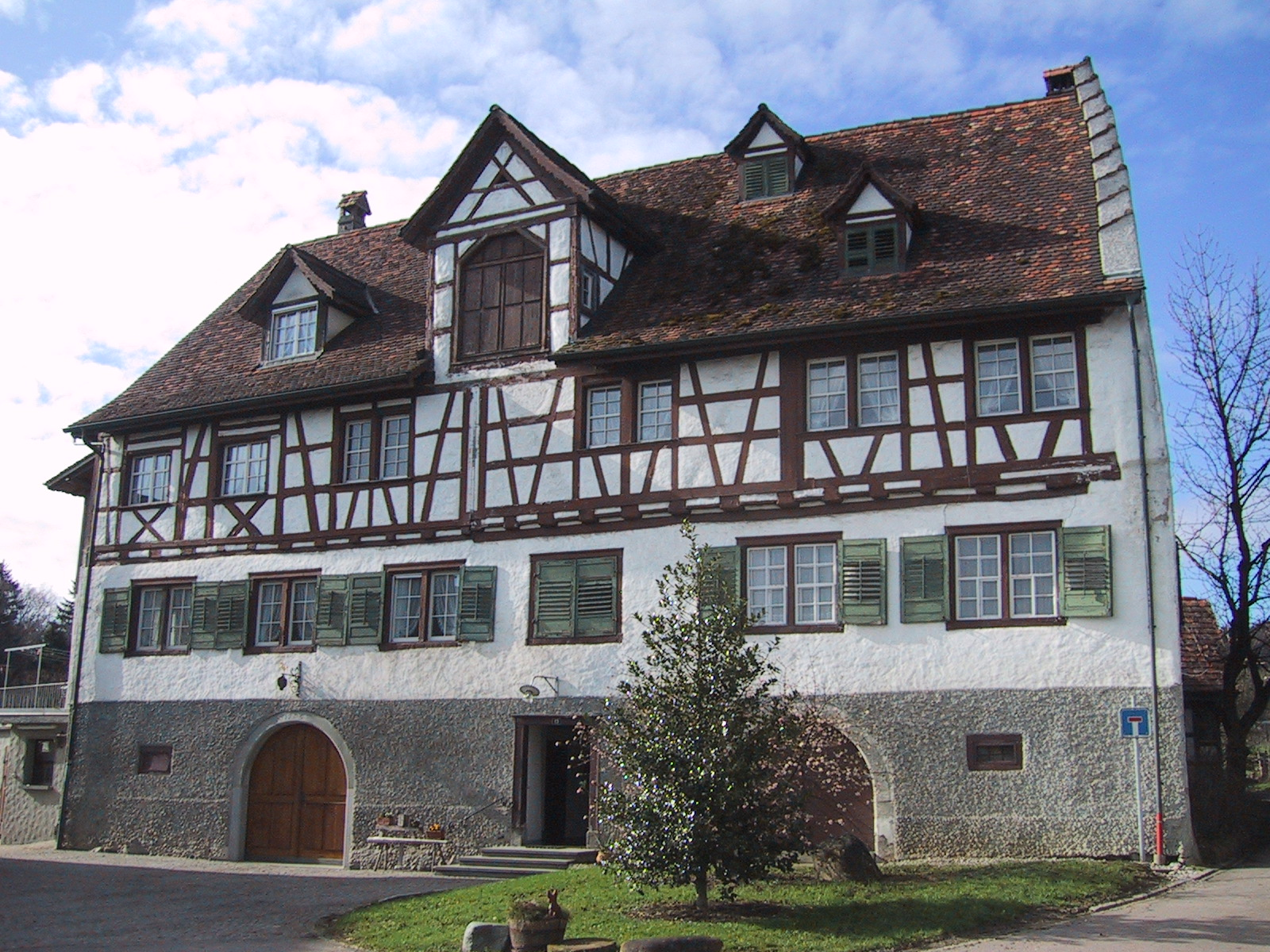 Hub, Aufnahme aus Fruthwilen TG